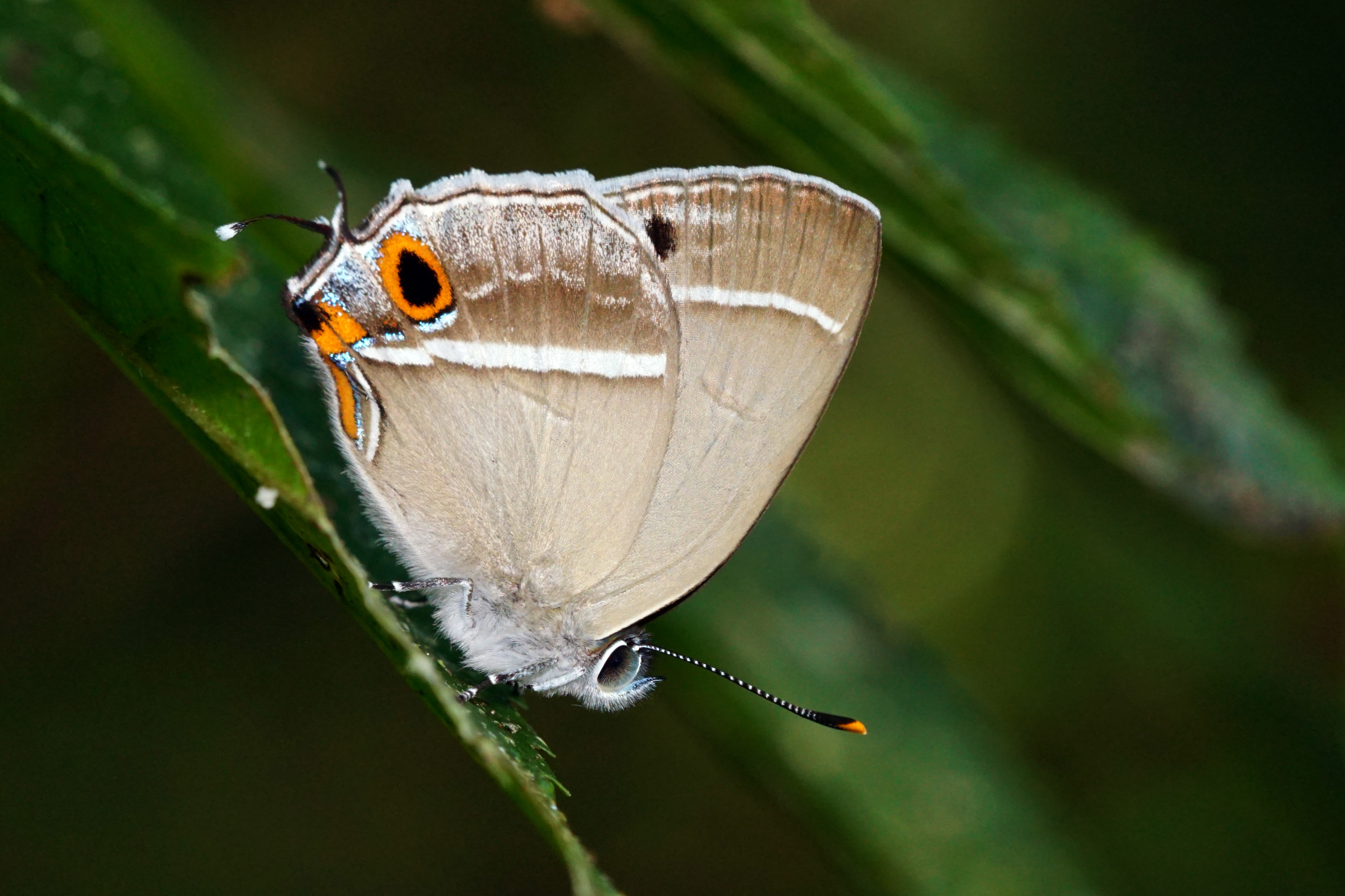 單線翠灰蝶 Chrysozephyrus splendidulus（雄）